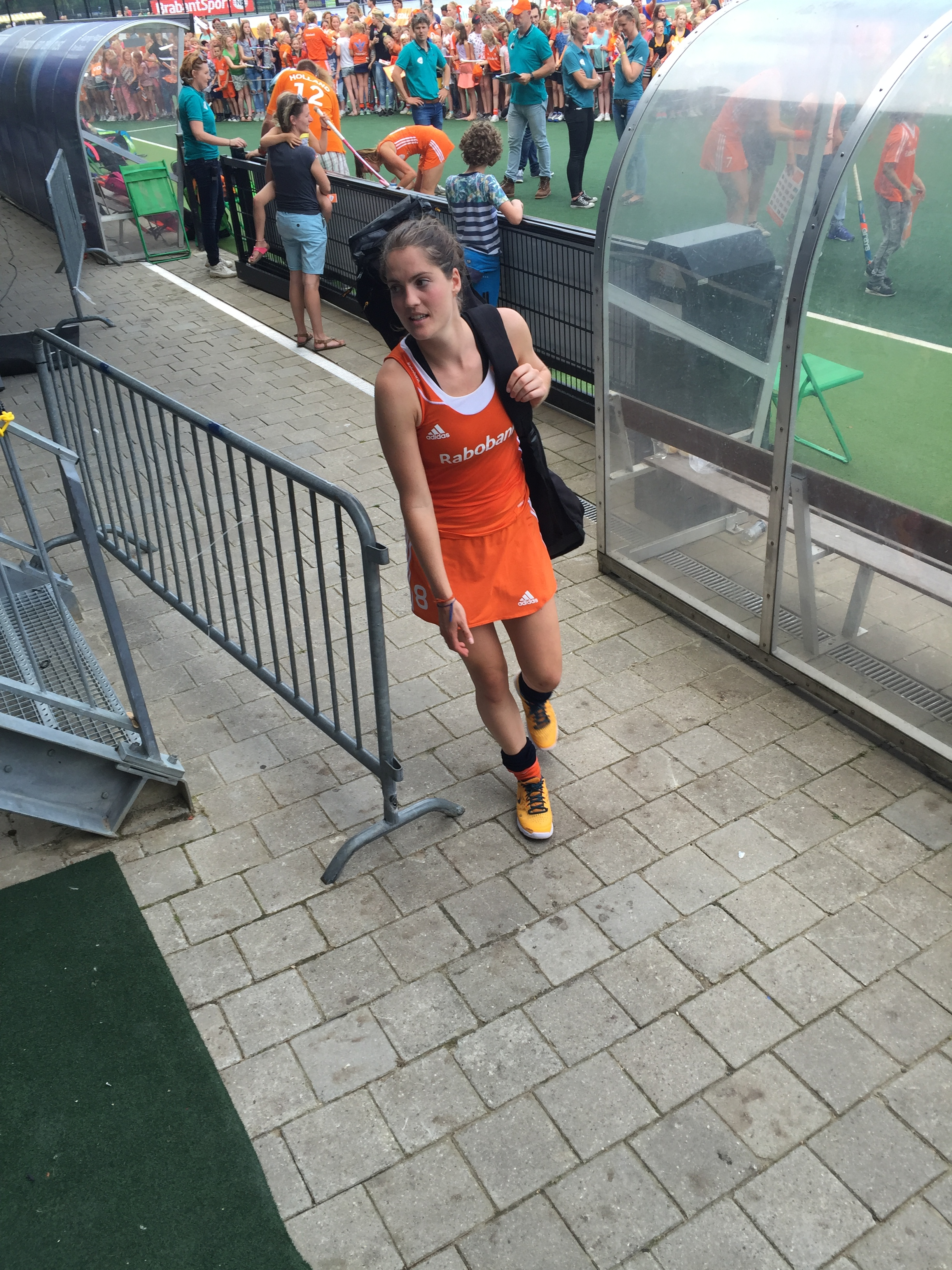 Women's field hockey interland NED-BEL Women's field hockey interland NED-BEL Men's field hockey interland of the Netherlands against Belgium on 9 July 2016 in Den Bosch, the Netherlands. Part of the Rabo Super Serie Team the Netherlands: 1 Joyce Sombroek 2 Frederique Derkx 3 Xan de Waard 4 Kitty van Male 6 Laurien Leurink 7 Willemijn Bos 8 Marloes Keetels 9 Carlien Dirkse van den Heuvel 10 Kelly Jonker 11 Maria Verschoor 12 Lidewij Welten 13 Caia van Maasakker 14 Jacky Schoenaker 16 Michelle van der Pols 17 Maartje Paumen 18 Naomi van As 19 Ellen Hoog 20 Laura Nunnink 21 Lauren Stam 22 Larissa Meijer 23 Margot van Geffen 24 Eva de Goede 29 Maartje Krekelaar 20 Anne Veenendaal